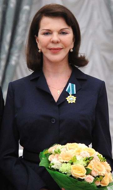 Актриса Консуэло де Хавиланд на церемонии награждения Орденом Дружбы